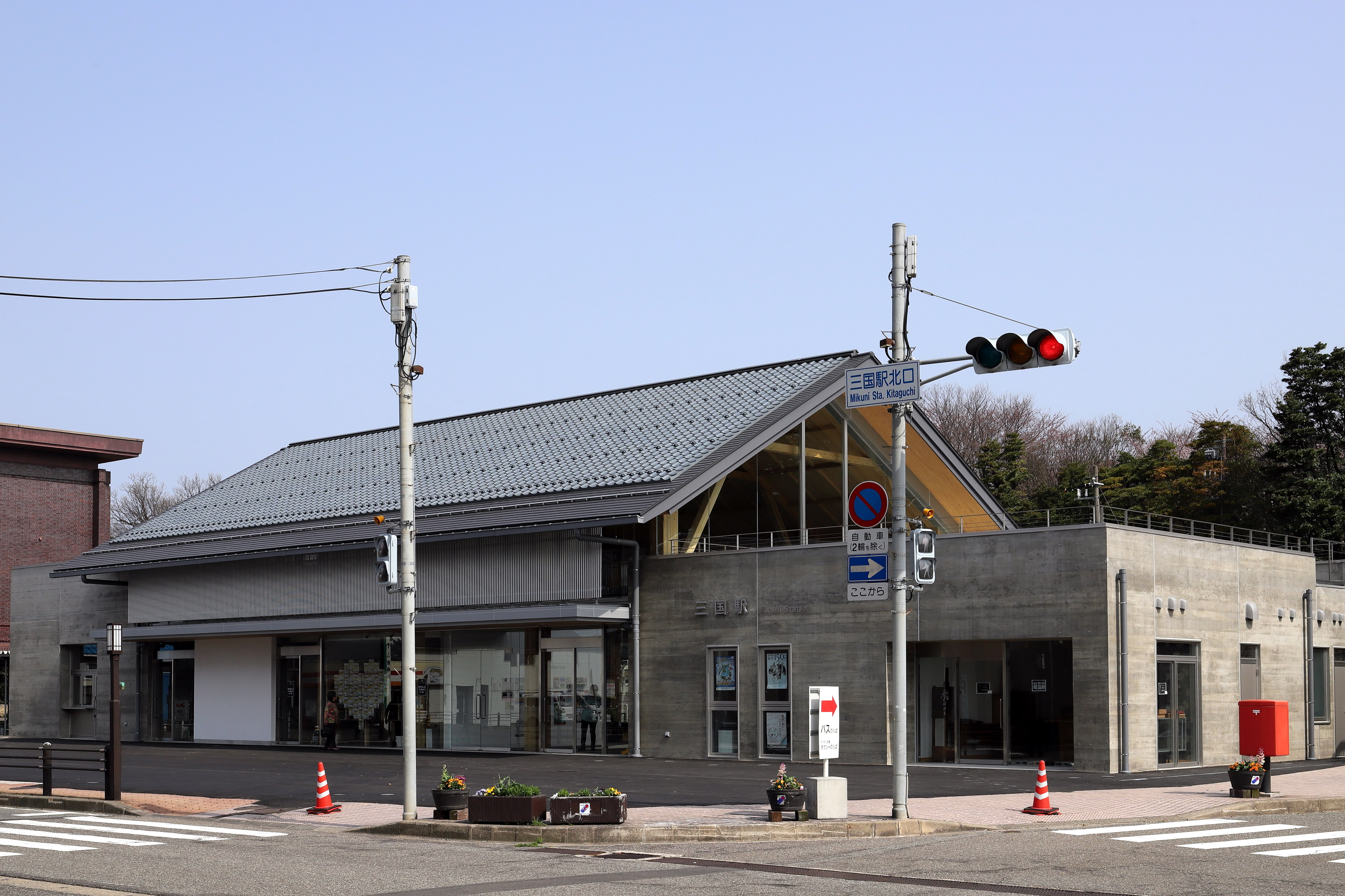 えちぜん鉄道 三国駅 駅舎全景